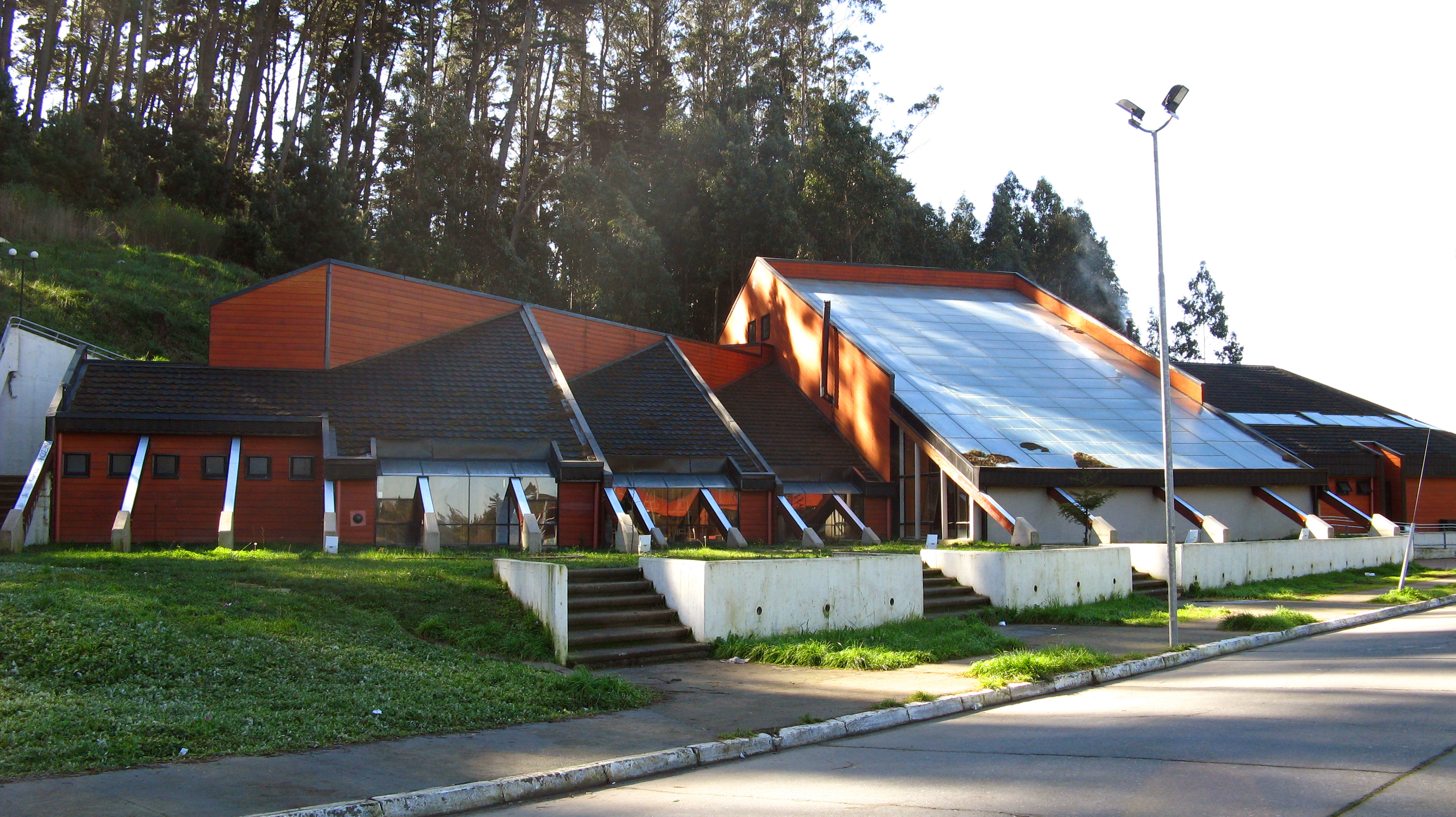 Centro Cultural San Pedro de la Paz, Laguna Grande, San Pedro de la Paz, Gran Concepción, Chile 2012